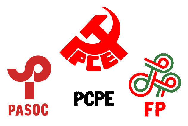 Símbolo de Izquierda Unida utilizado en pósteres de campaña y papeletas electorales desde 1986, como por ejemplo en [1] y [2]